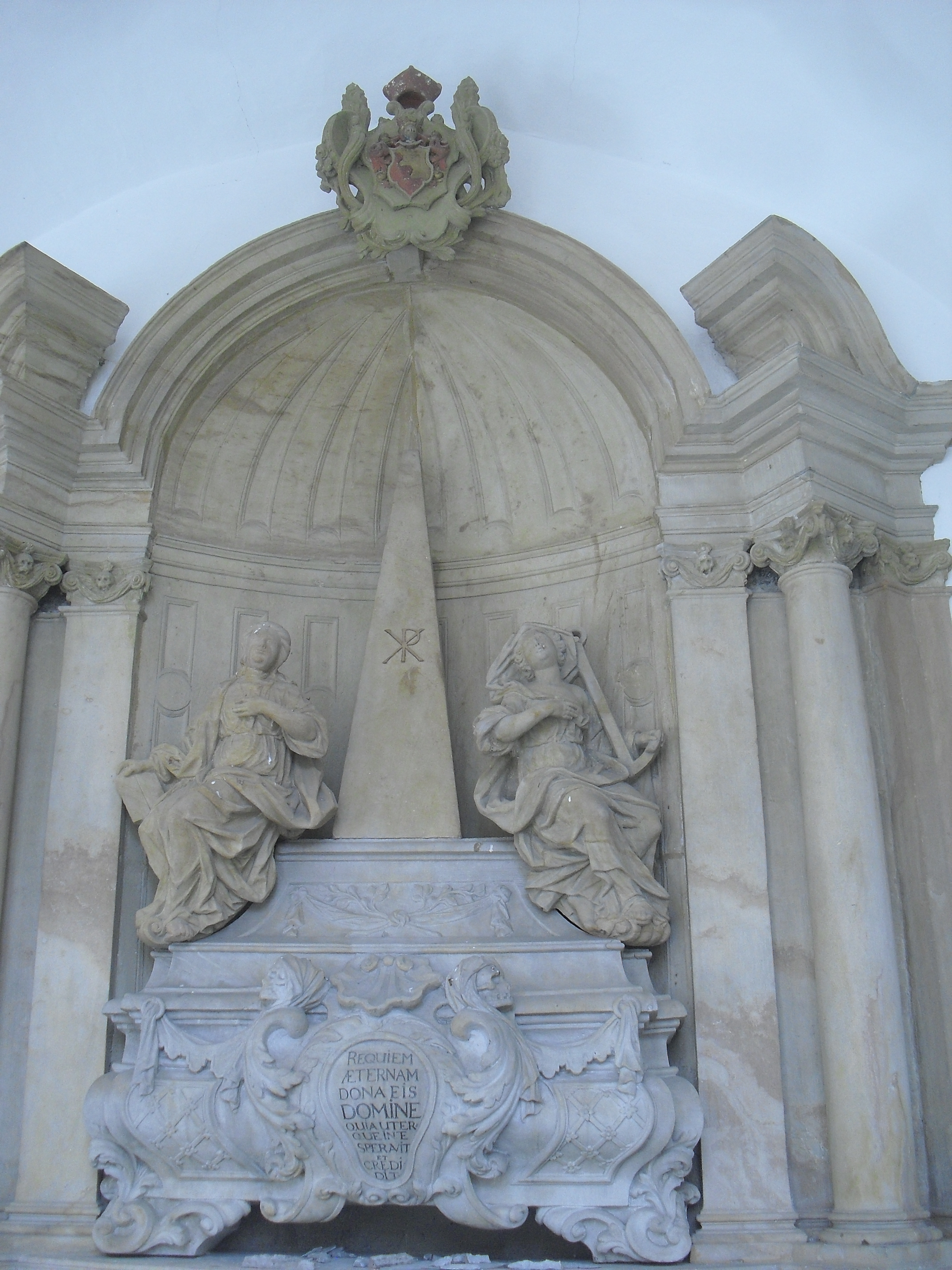 Epitaph der Domherren Ferdinand Friedrich von Droste zu Erwitte und Benedict Wilhelm Arnold Droste zu Erwitte im Paderborner Dom